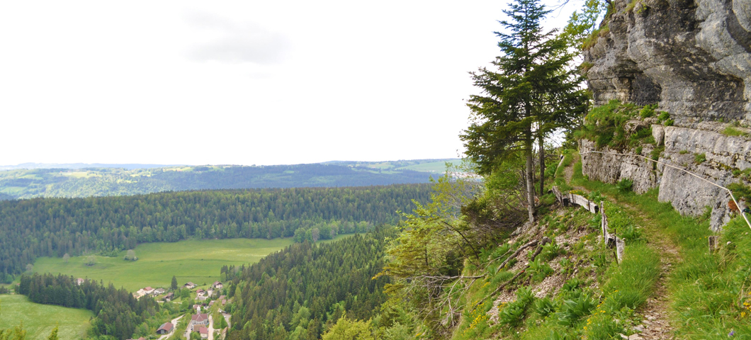 Site touristique de la Grande cave